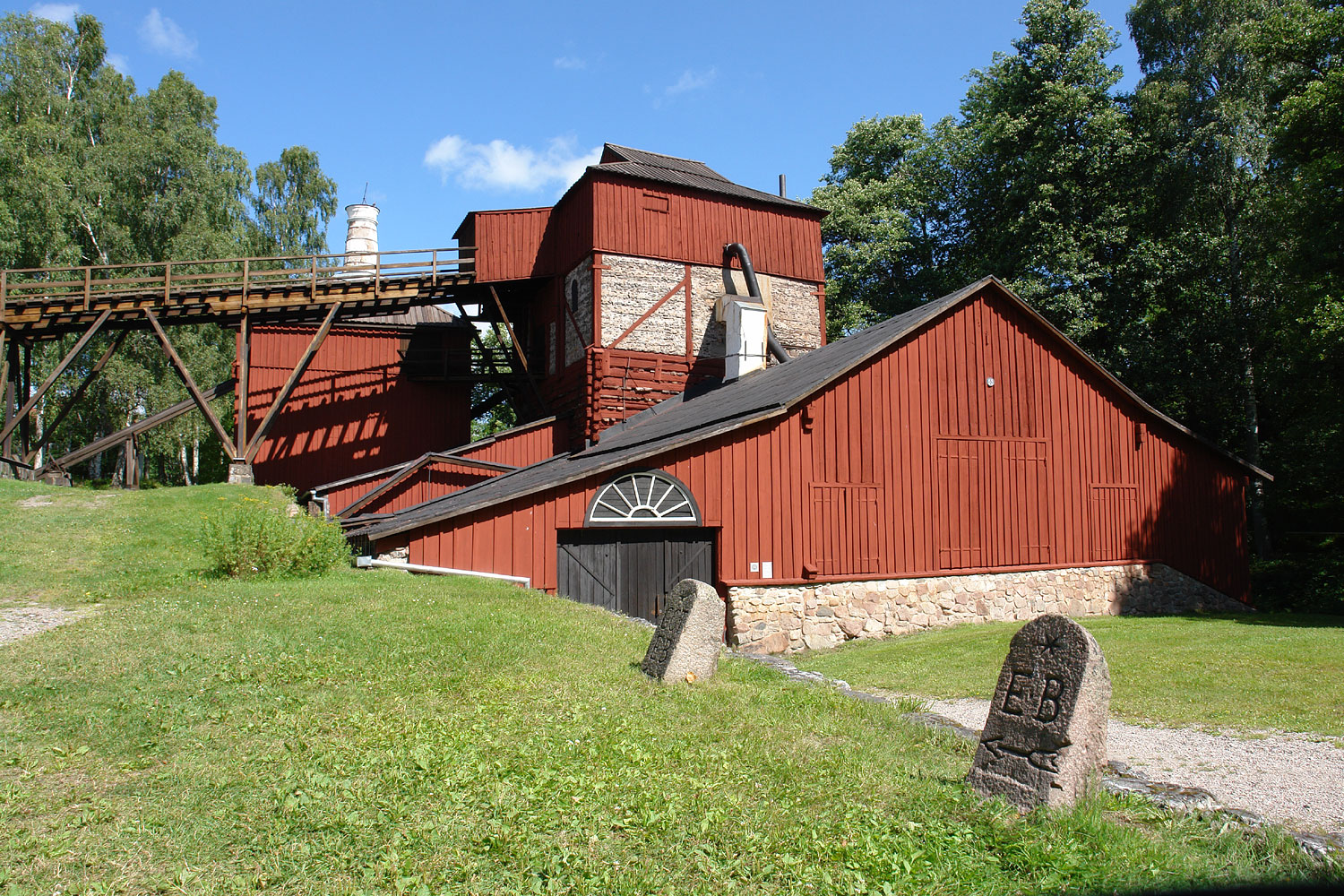 Колишній Енгельсберзький залізоробний завод, розташований у Швеції у селі Енгельсберг. Комплекс заводу занесено у список світової спадщини ЮНЕСКО у Швеції. У центрі - доменна піч.